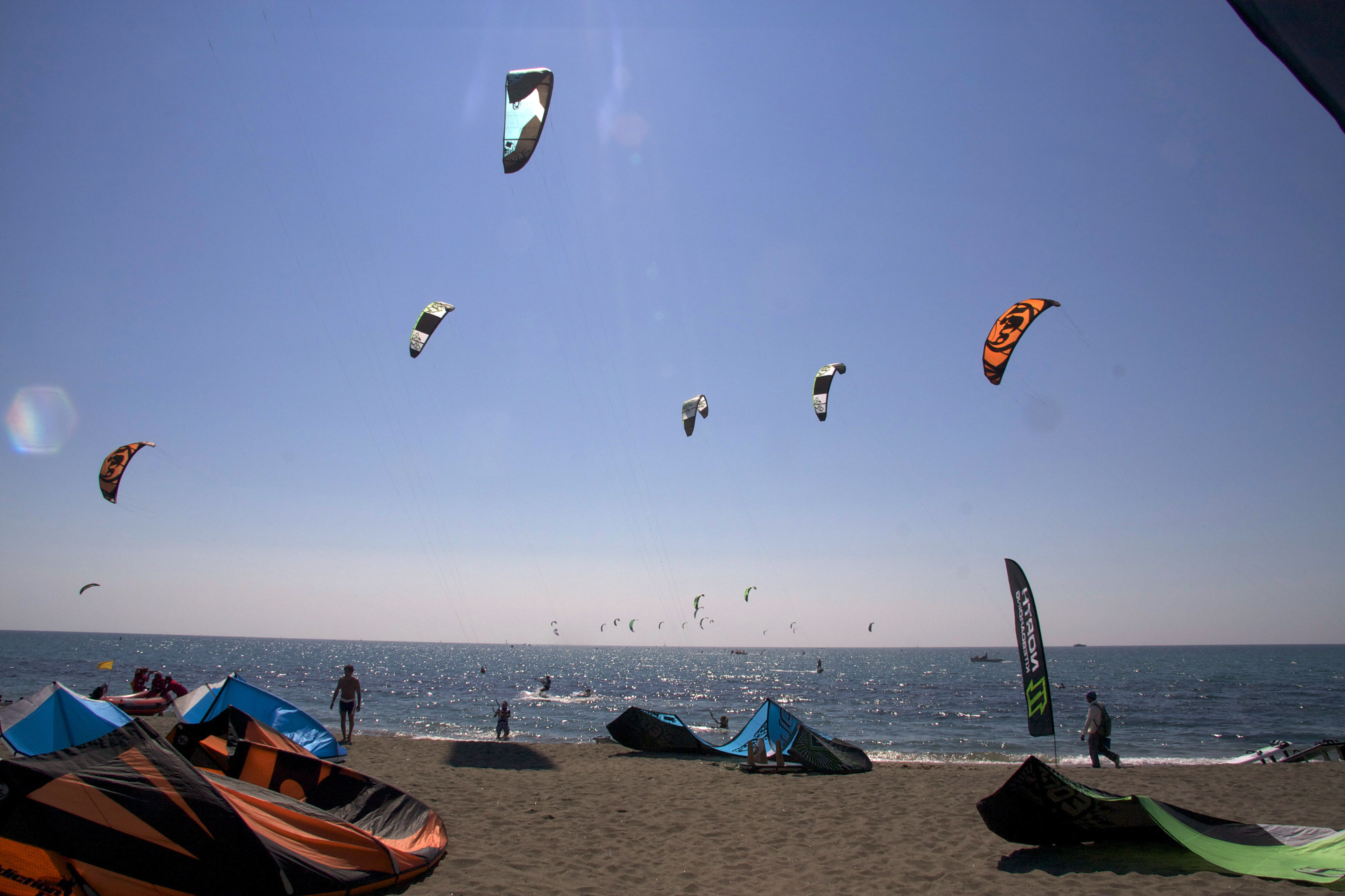 3° LNI KITE CONTEST (Gara RACE - Kite Surf) - 17 e 18 settembre 2011 - Lega Navale Italiana sezione Lido di Ostia